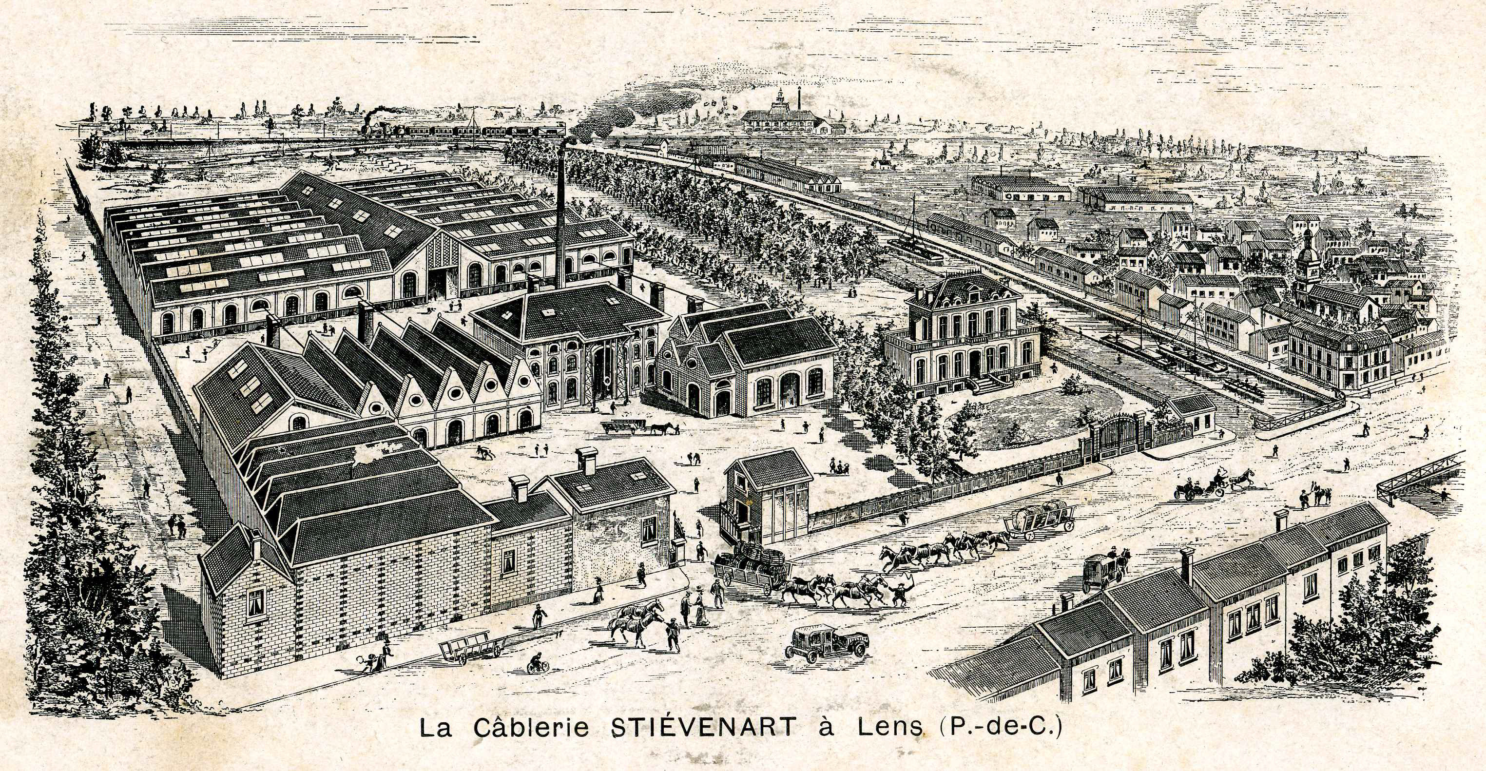 La Cablerie de lens